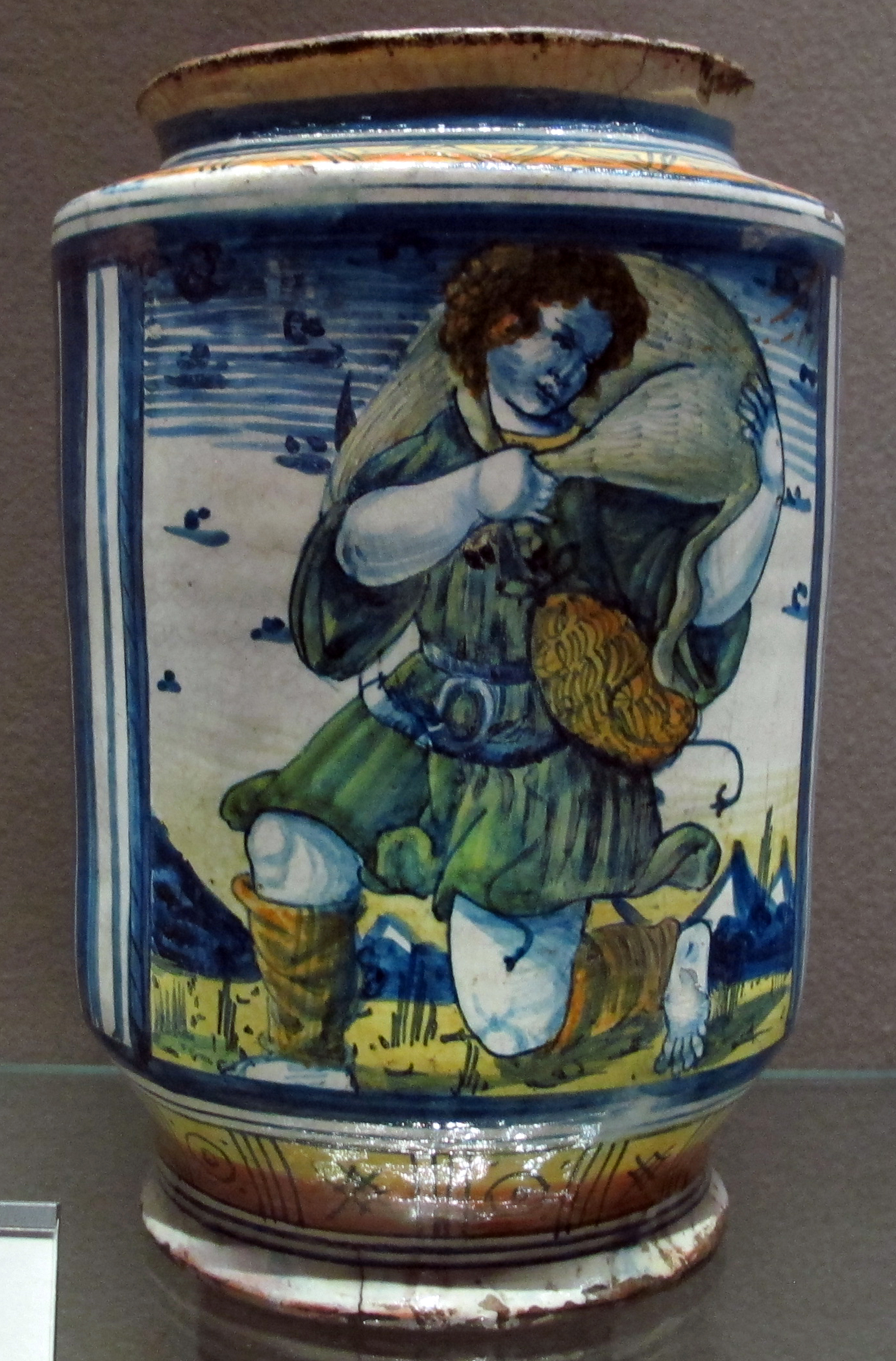 Maiolica al Louvre, Parigi